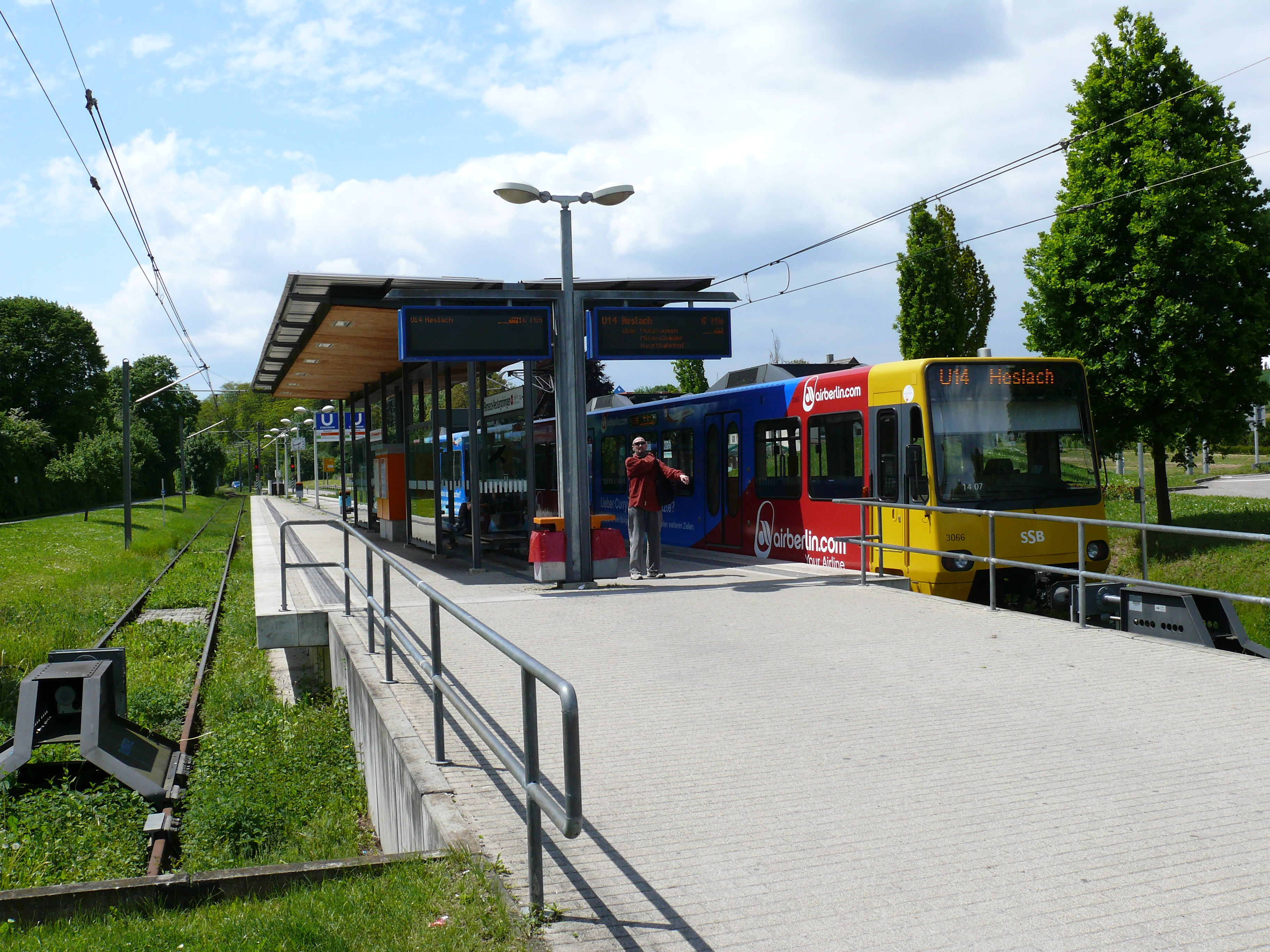 Die Stadtbahnhaltestelle Remseck-Neckargröningen in Remseck am Neckar.